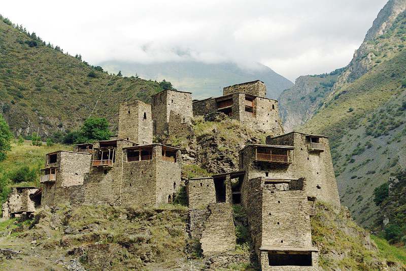 Shatili village, Khevsureti, Georgia